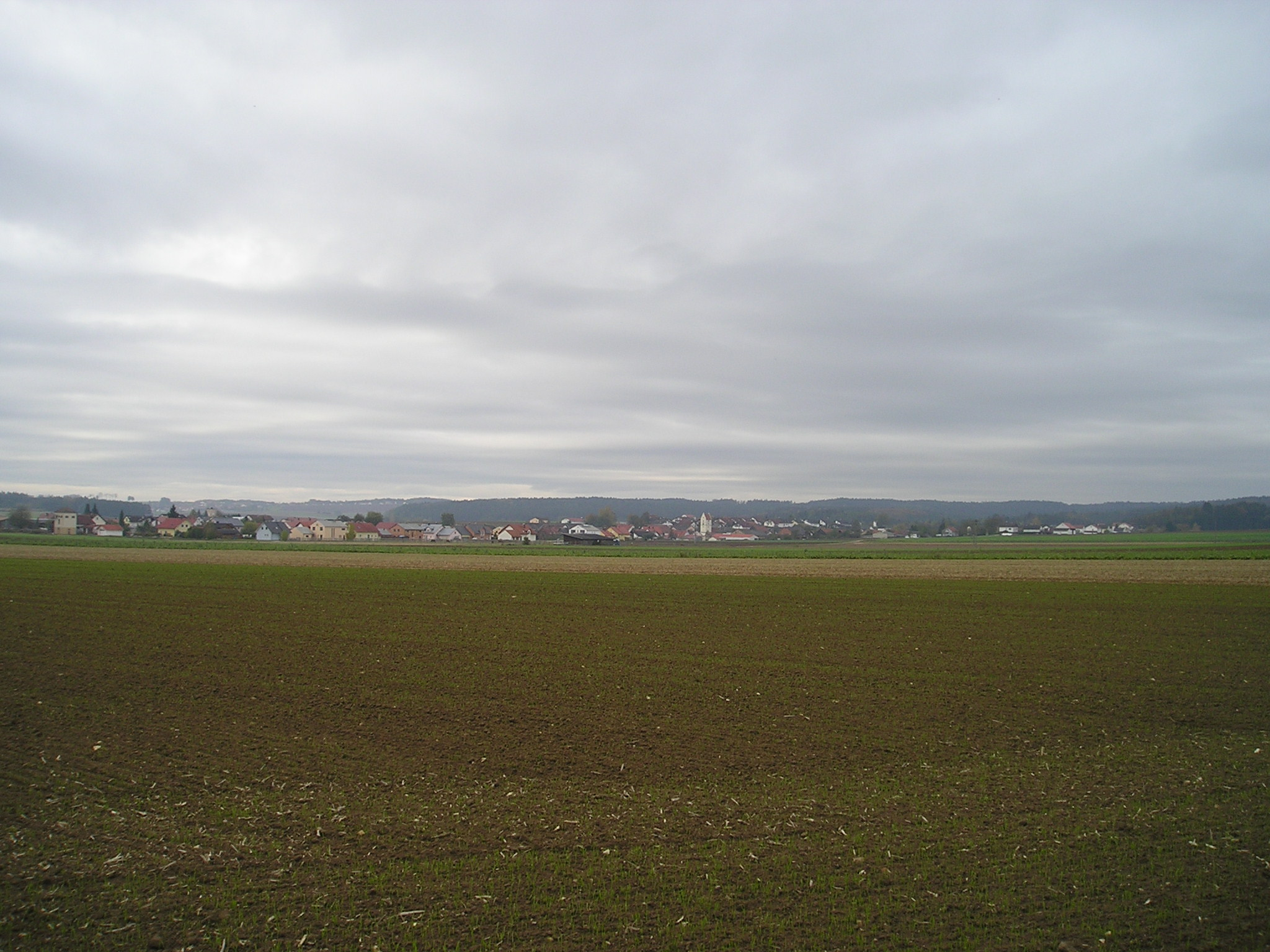 Ochsenfeld, Jura-Dorf, Gemeindeteil von Adelschlag im Landkreis Eichstätt, Regierungsbezirk Oberbayern